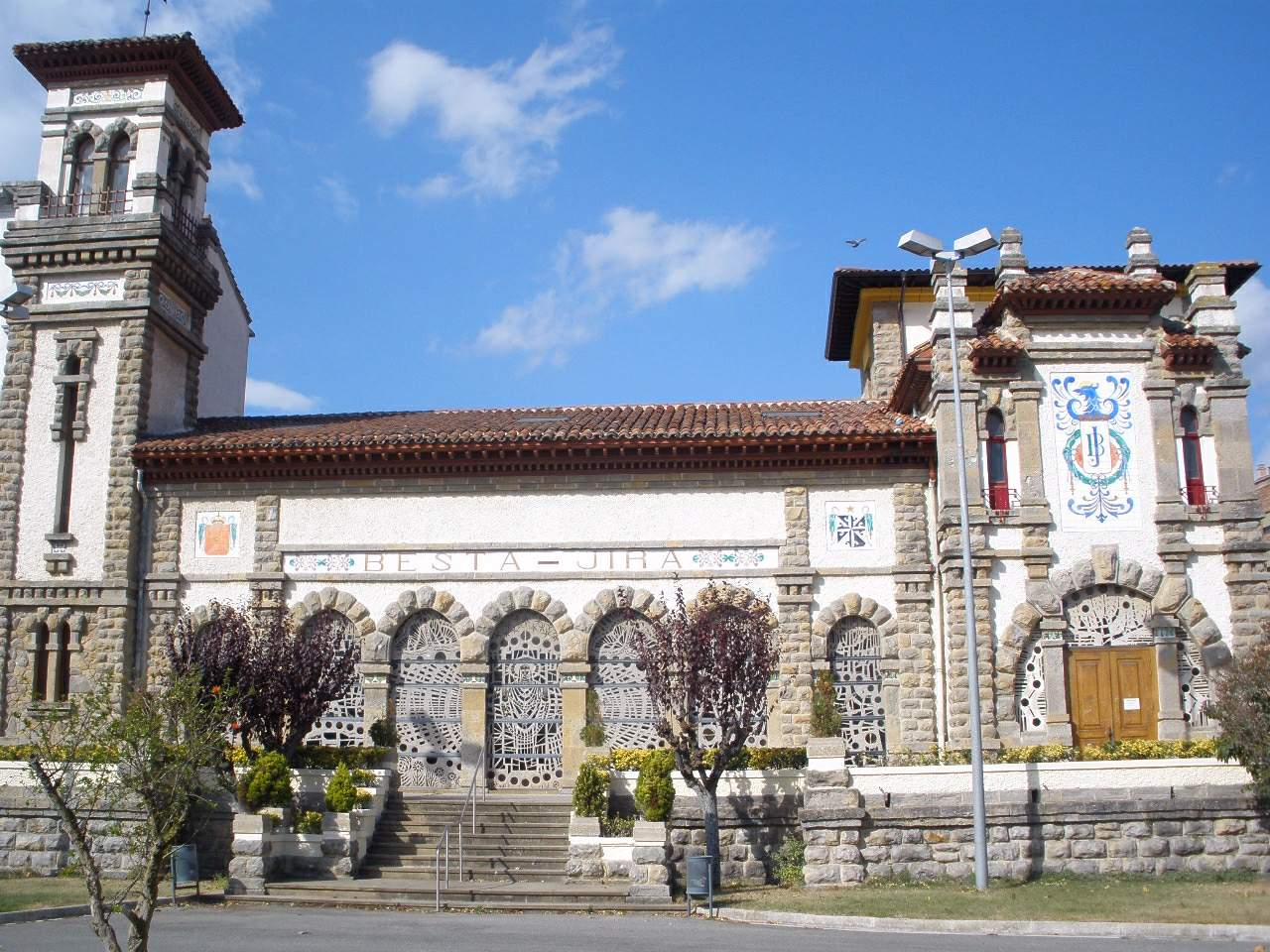 Iglesia de Nuestra Señora del Rosario (Villava, Navarra)